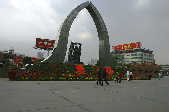 Xining-railway-station, Xining, Qinghai, China